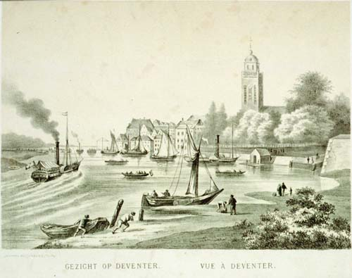 Dit is een tekening van het Pothoofd te Deventer gezien vanuit zuidelijke richting. Datum ca 1850; zie stoomraderboten.